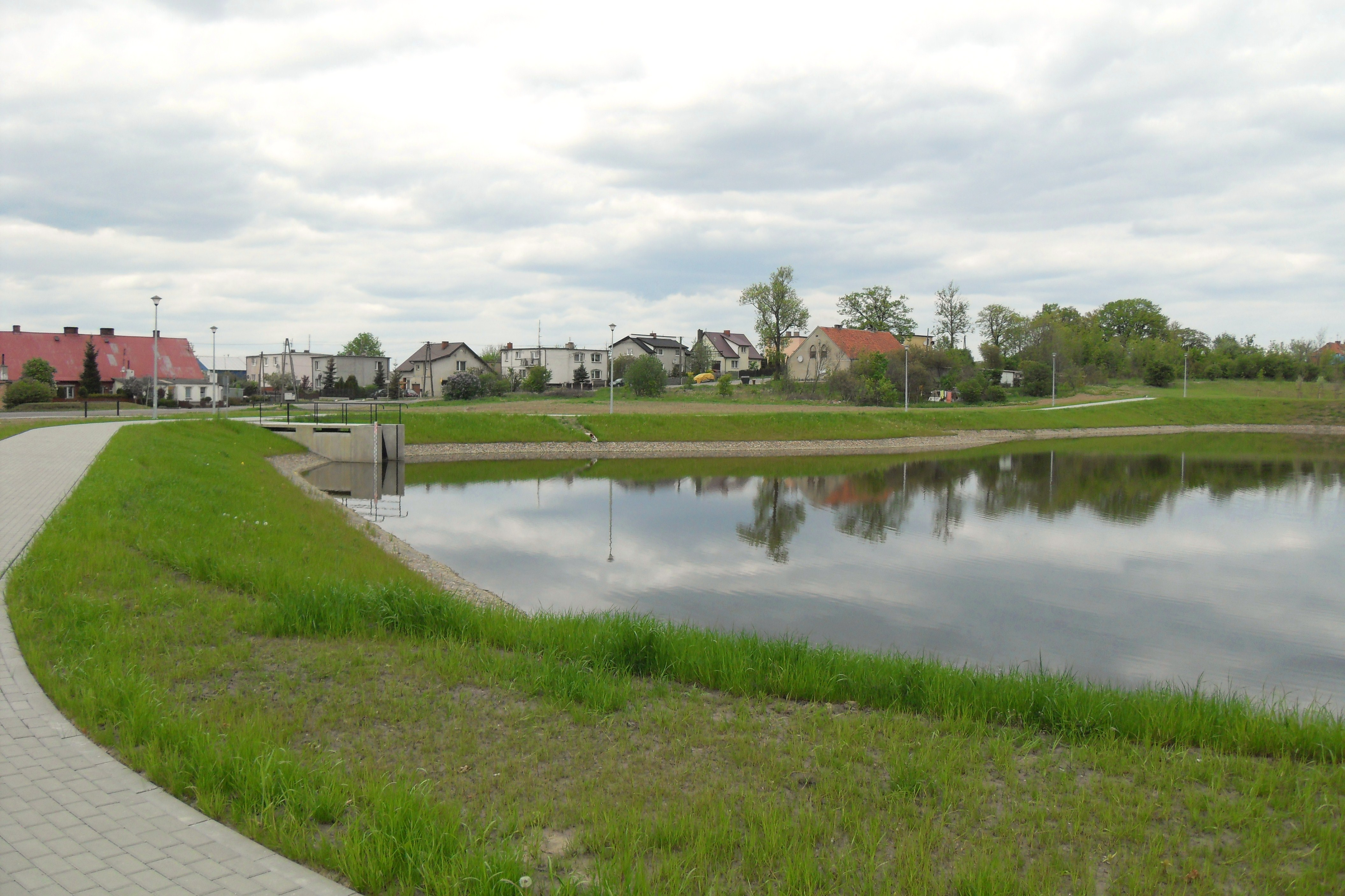 Gdańsk Bysewo. Zbiornik retencyjny Budowlanych II.